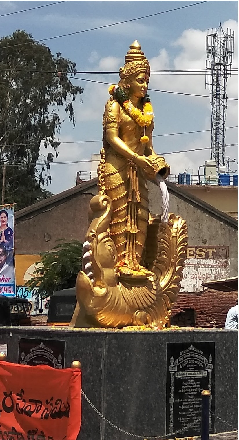 కృష్ణవేణి విగ్రహం,గద్వాల